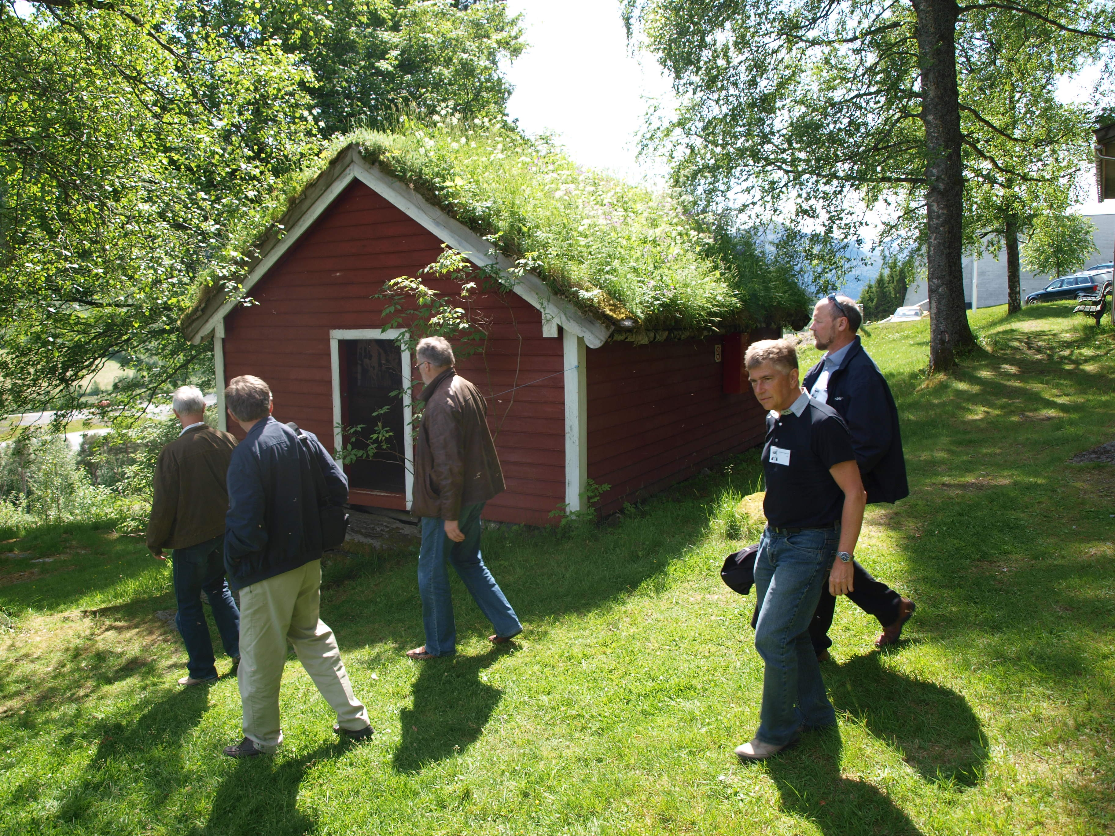 Huset som vart brukt til samlingane på Ivar Aasen-museet 1897 - 1946